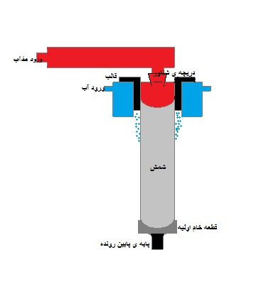 شمای ریخته گری به روش سرمایش مستقیم